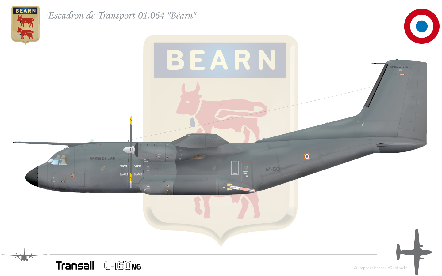 Transall C160ng escadron 1/64 bean